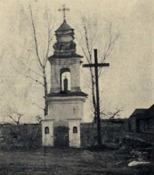 Беларуская (тарашкевіца): Слонім (Słonim), вуліца Панасоўская (vulica Panasoŭskaja). Капліца Сьвятога Дамініка